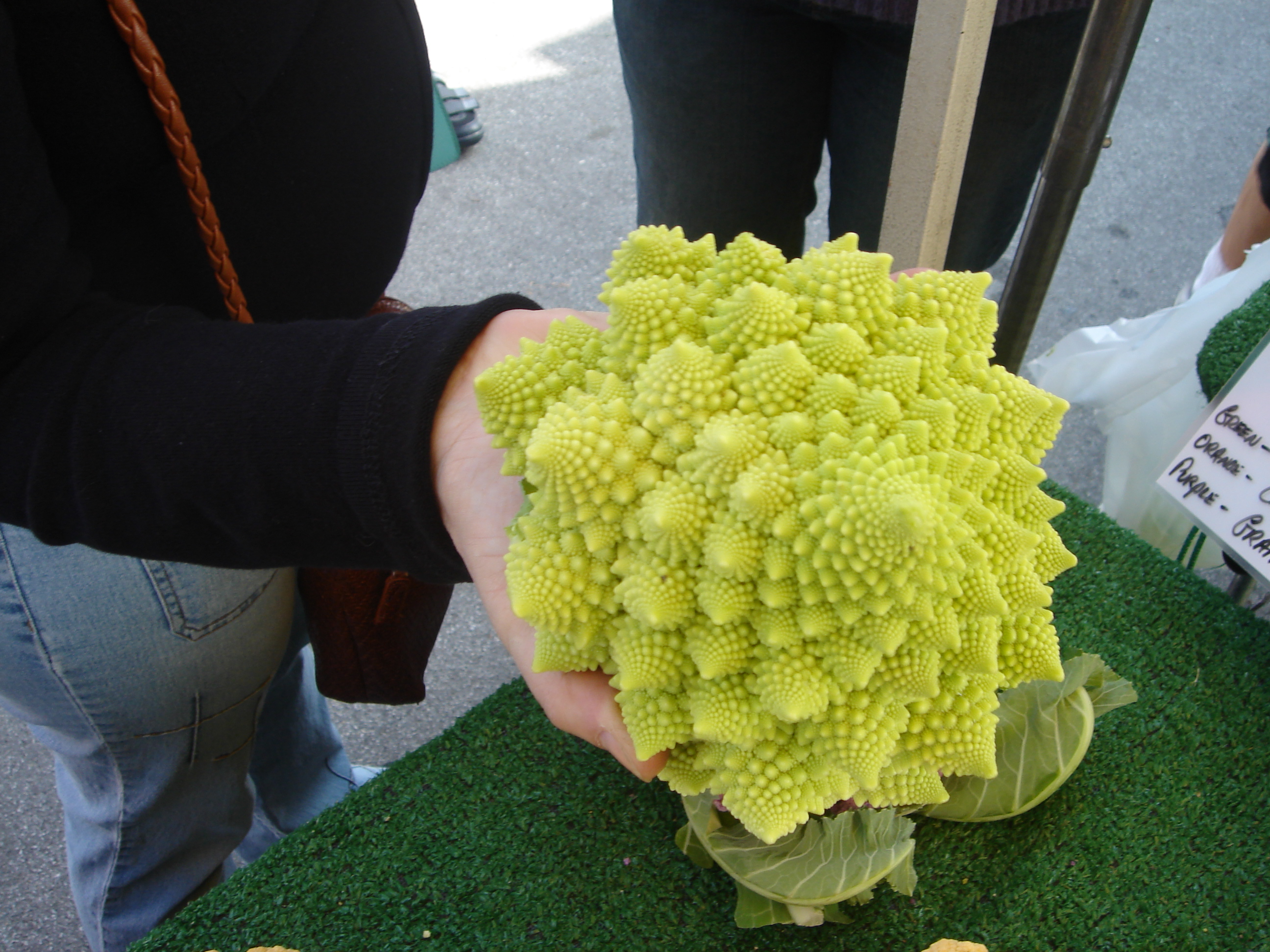 Weiser Farms Fractal Cauliflower.